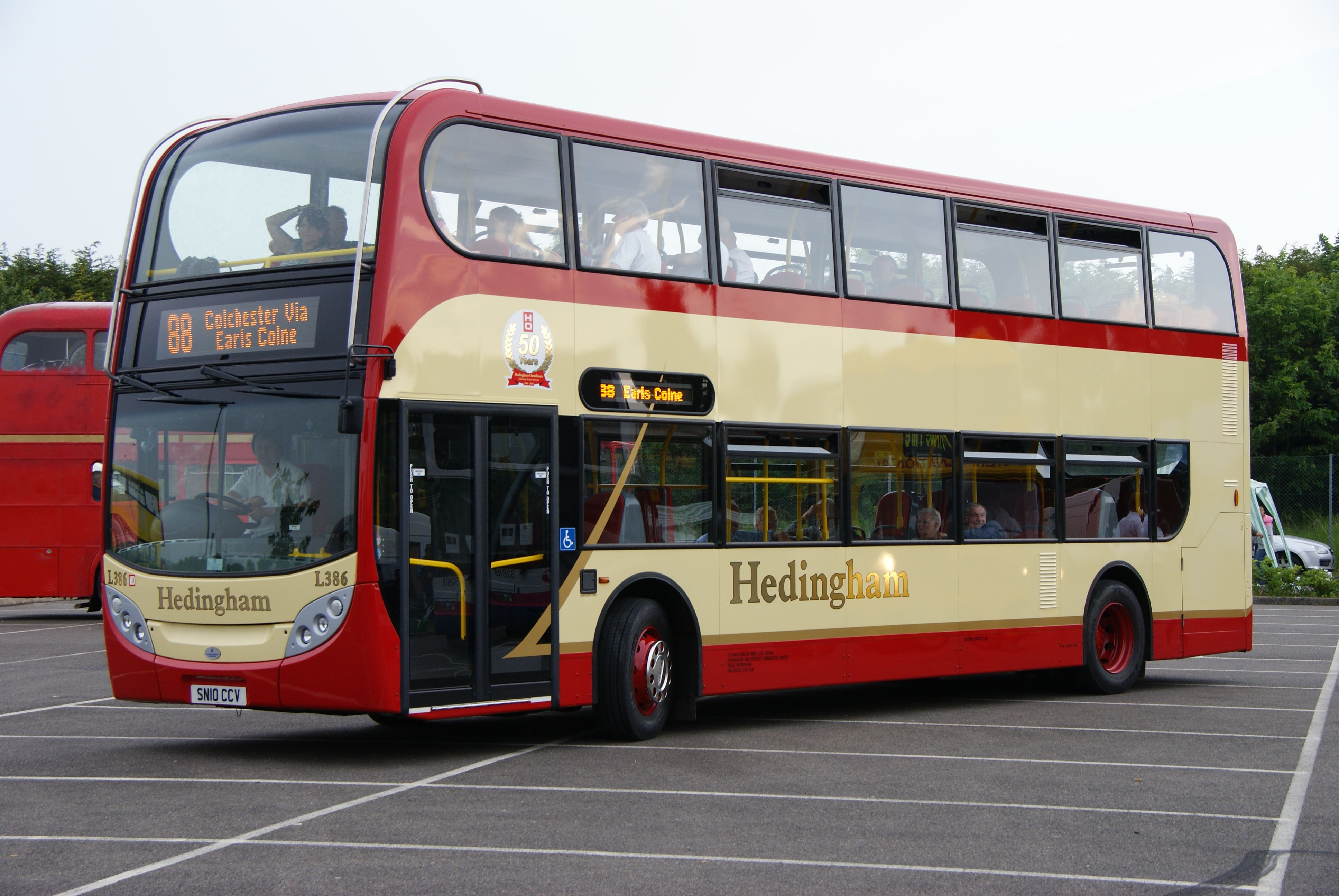 L386-SN10CCV-4 060610 CPS